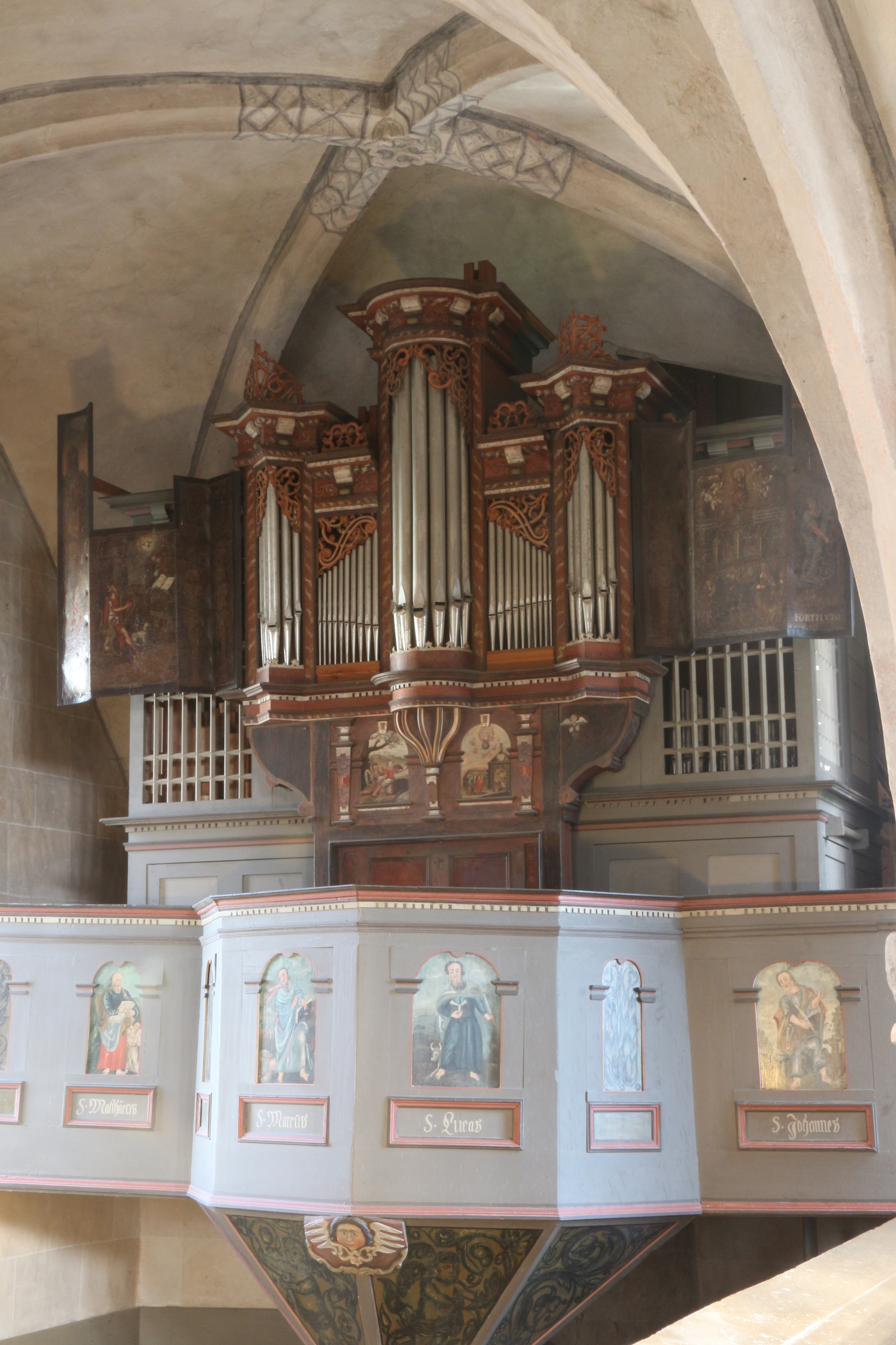 Lohra - Evangelische Kirche